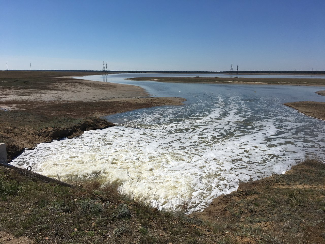 Очень интенсивное течение реки Бакланиха, близ поселка Малиновое Озеро..